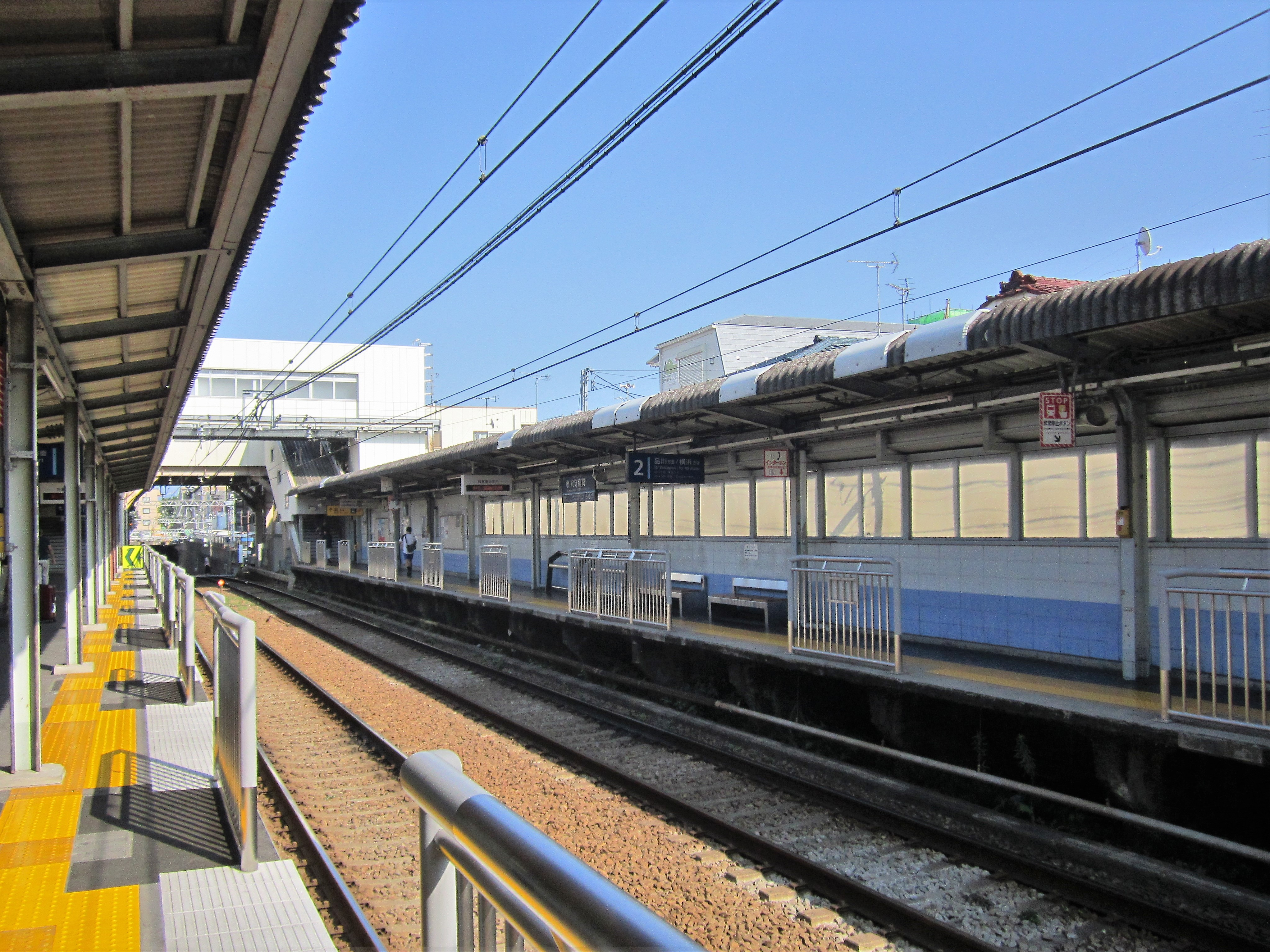 穴守稲荷駅ホーム